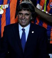 Томас Грімм — швейцарський юрист, футбольний функціонер і президент УПЛ